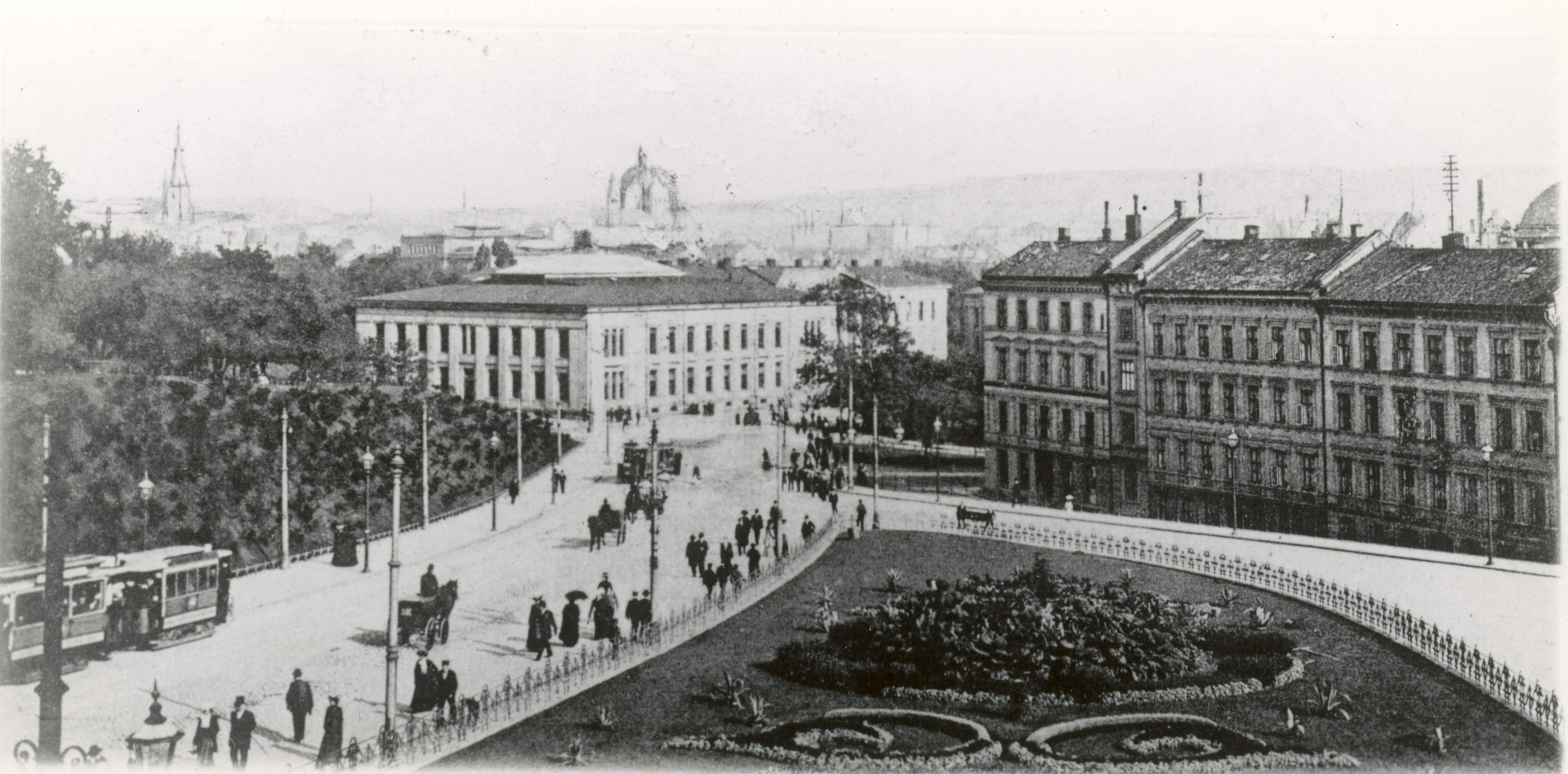 Drammensveien, Universitetet, 7. juniplassen i Oslo, Oslo